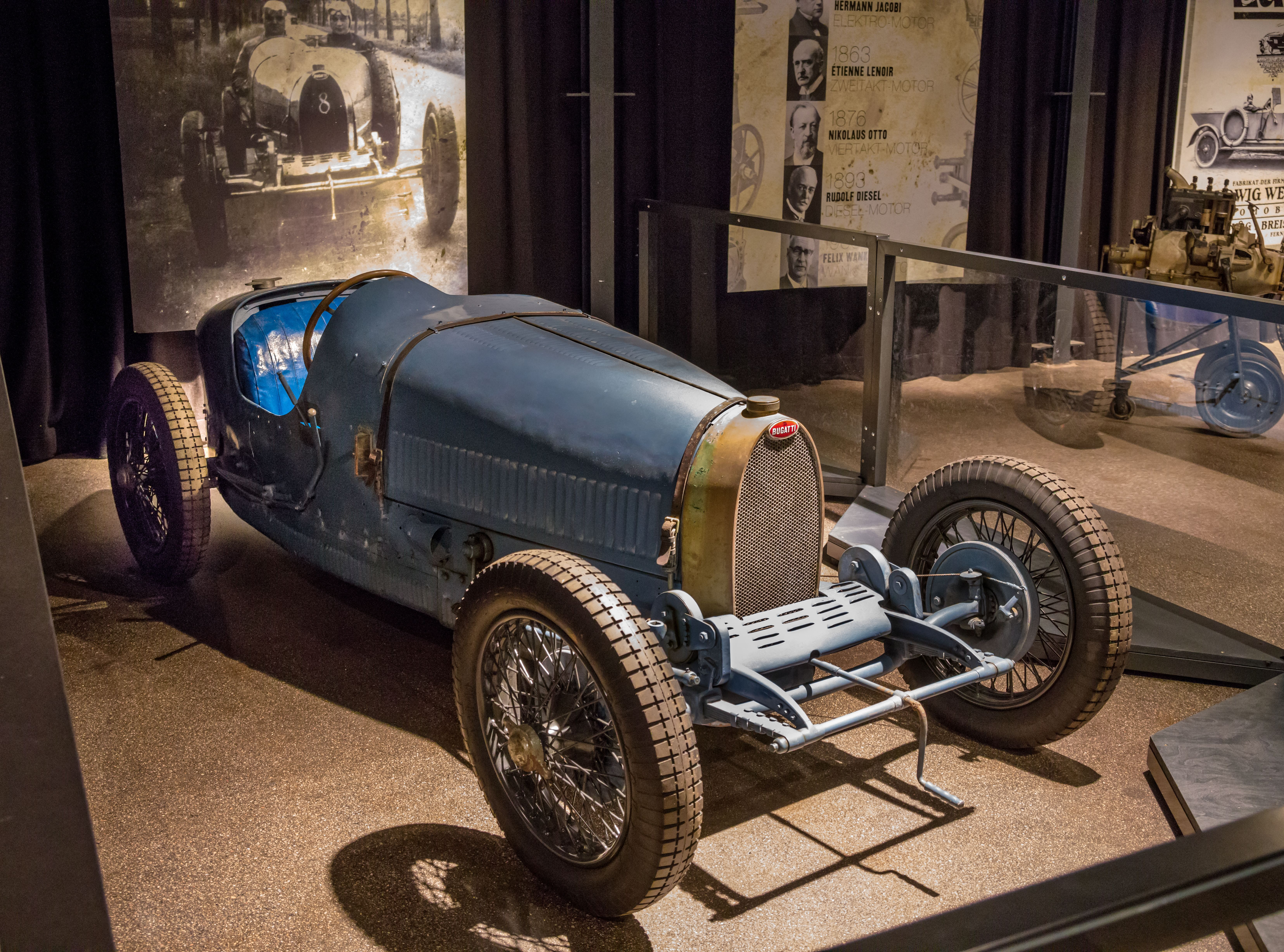 Das Volante Oldtimermuseum in Kirchzarten